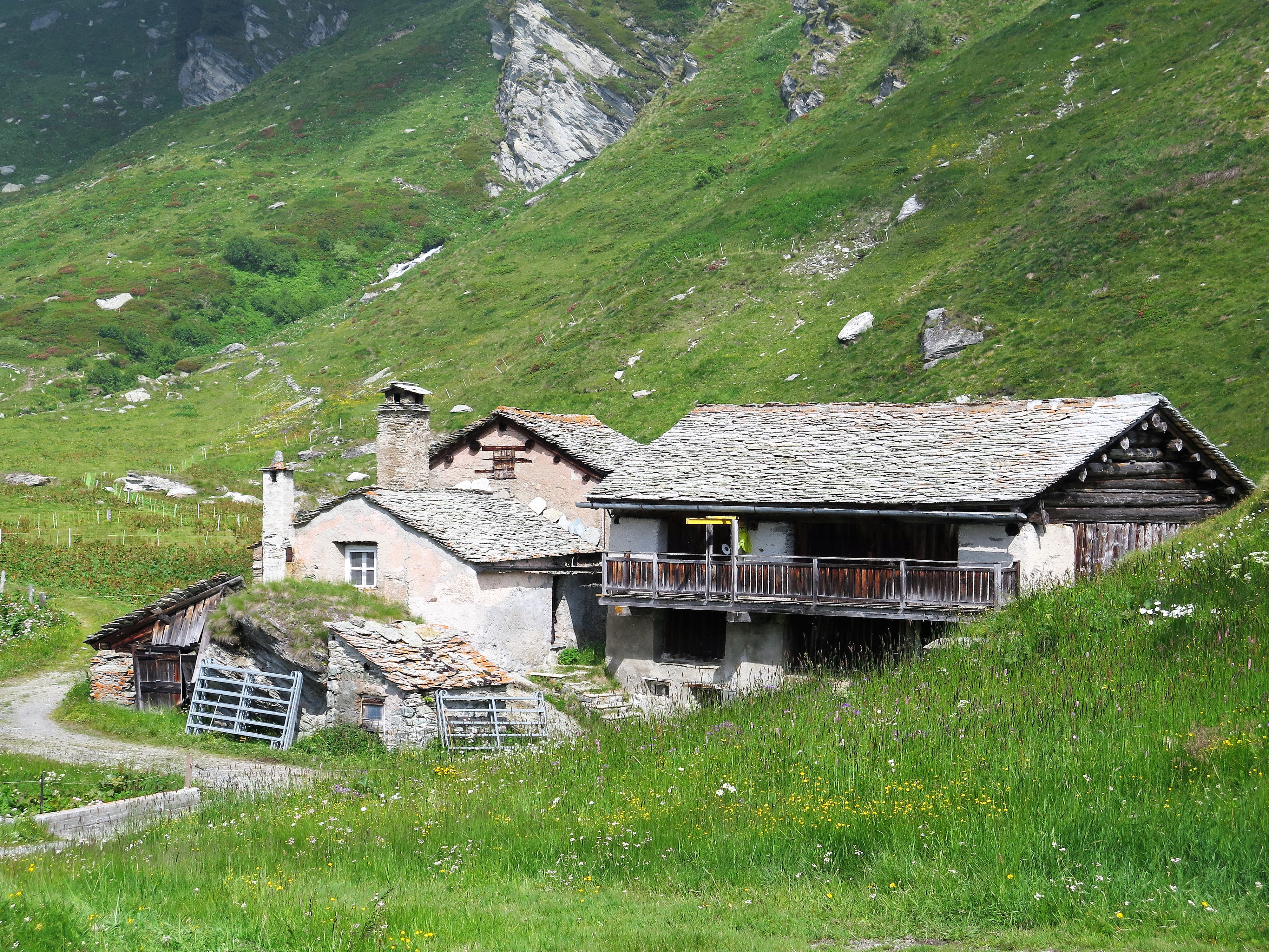 Alte Gebäudegruppe im Weiler Pila bei Maloja